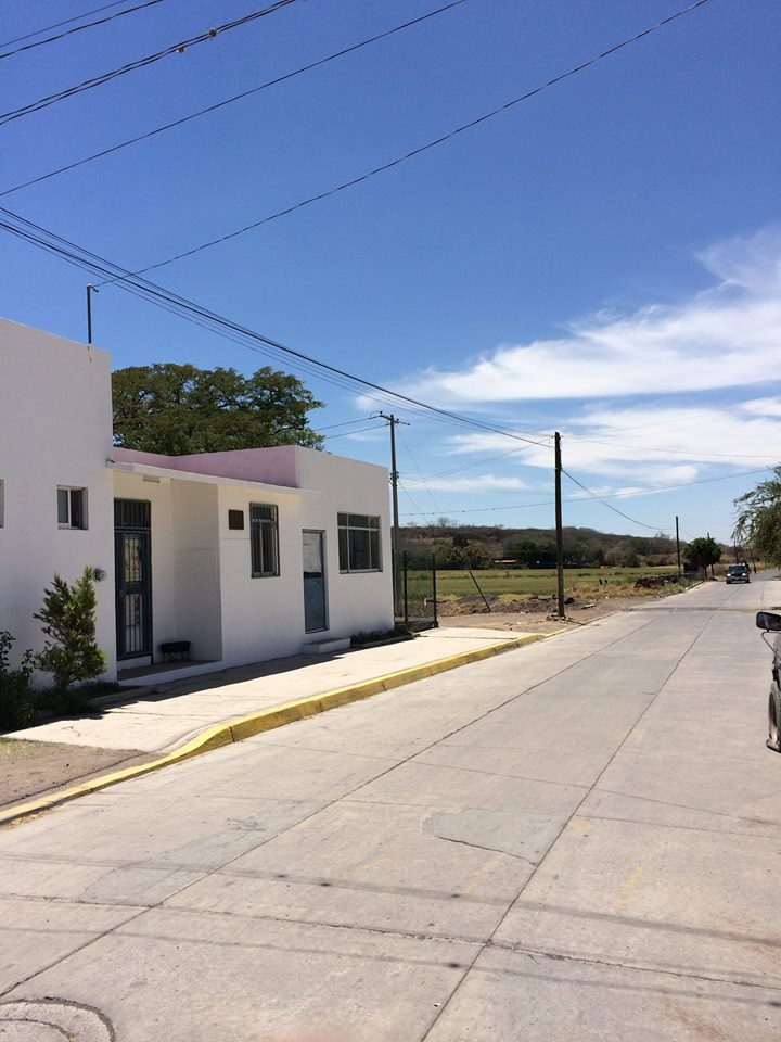 La Clinica